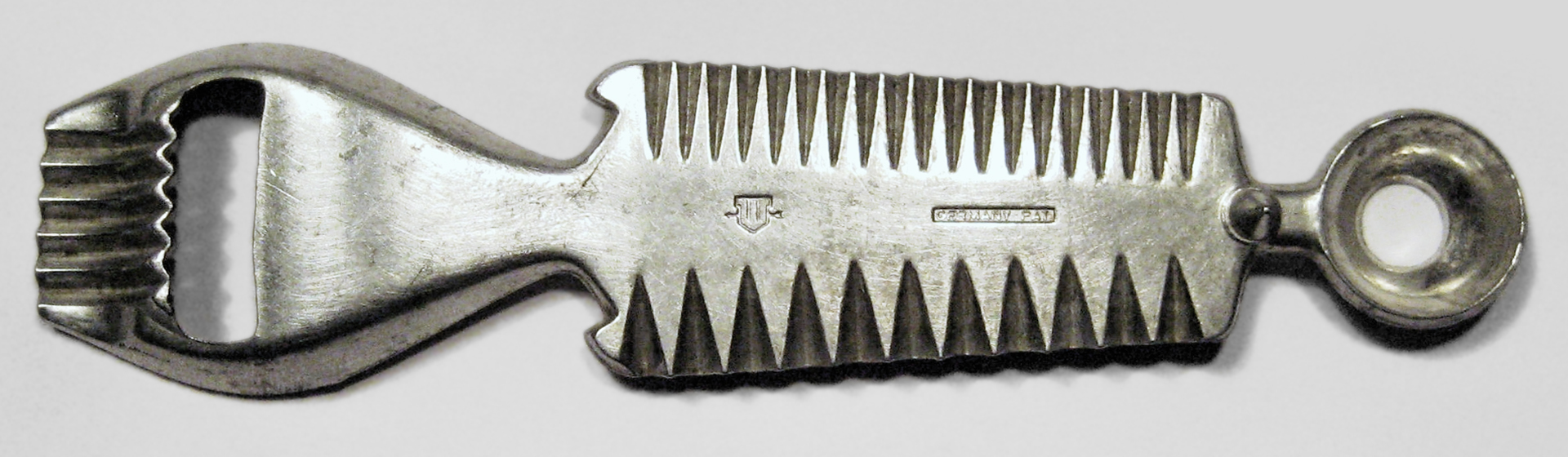 Mehrzweckgarnierer „Decorex-Spezial“ (Rückseite), Fabrikat: Westmark, Material: Aluminium (nicht spülmaschinengeeignet), Abmessungen: 150 x 38 x 20 mm.Zum Formen von Streifen, Würfeln, Kugeln aus Butter, Käse und Früchten etc., sowie für dekorative Butterröllchen. Mit Kapselheber und Dorn (auf der Rückseite) zum Dosenlochen. Hergestellt etwa Ende der 1950er / Anfang der 1960er Jahre.